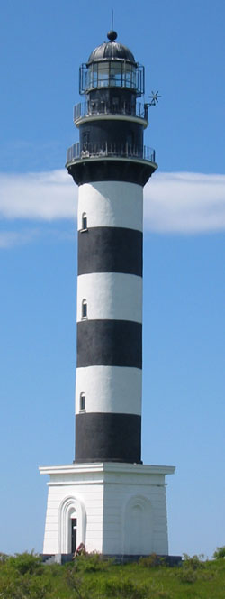 Osmussaare tuletorn